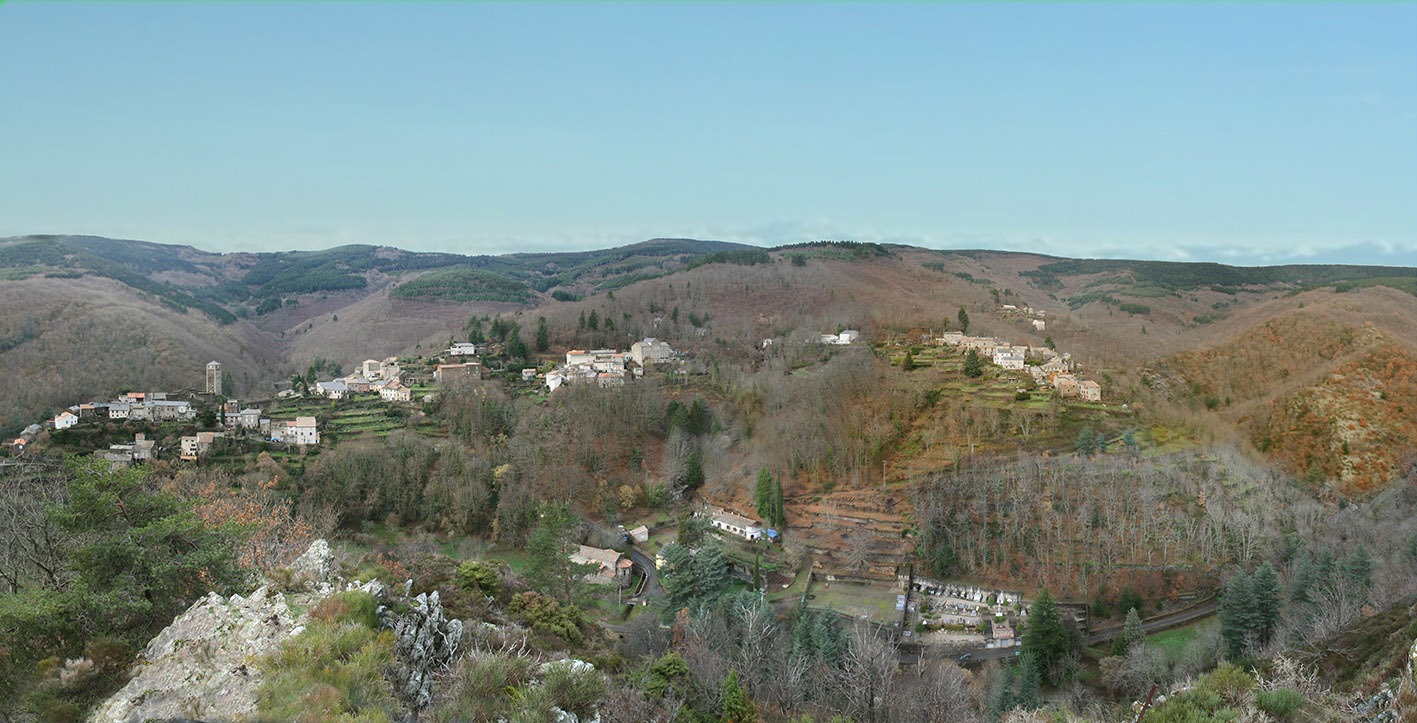 photomontage du village